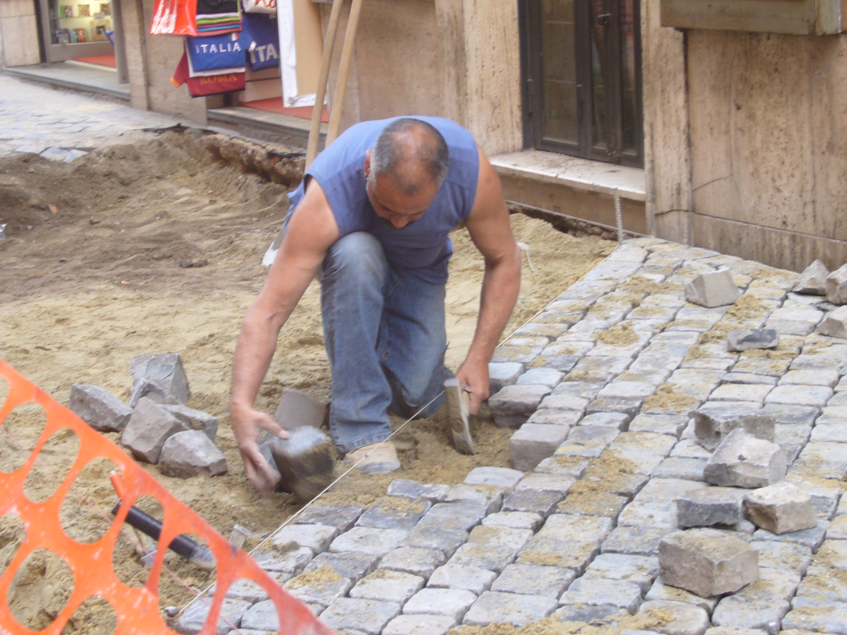 Roma: selciarolo al lavoro (posa in opera di sampietrini)